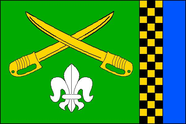 Vlajka obce Vojkovice (okres Frýdek-Místek)